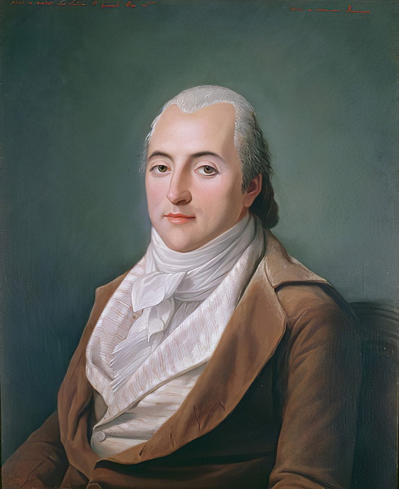 Portrait posthume de Claude-Henri de Rouvroy, comte de Saint-Simon, âgé de 35 ans. Huile sur toile d'Hippolyte Ravergie d'après un dessin d'Adélaïde Labille-Guiard, BnF, Bibliothèque de l'Arsenal, 1848.